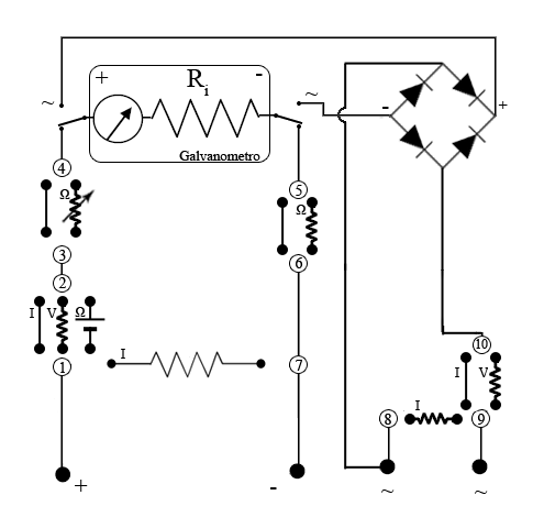 Circuito de un multimetro